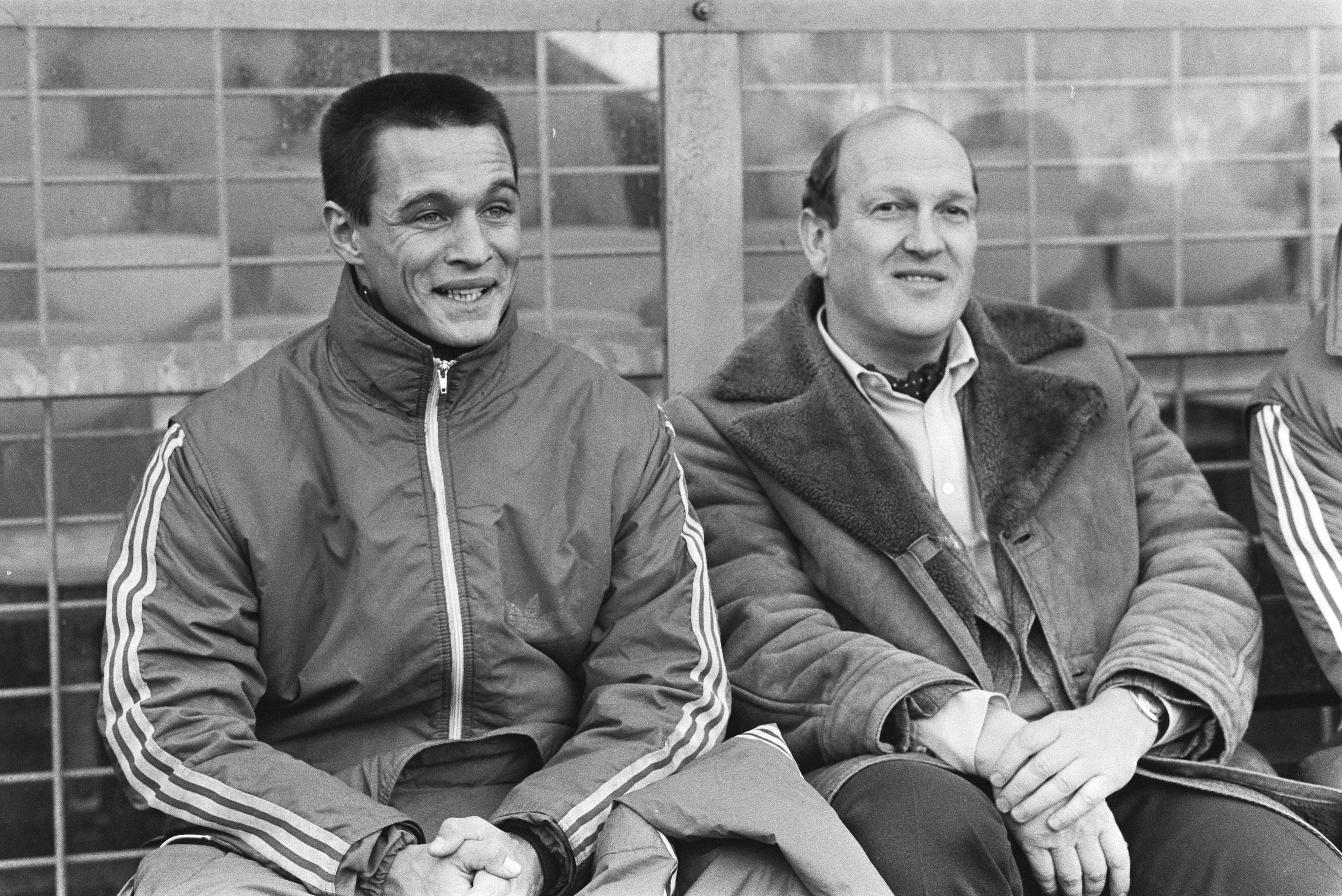 Collectie / Archief : Fotocollectie Anefo Reportage / Serie : [ onbekend ] Beschrijving : Ajax tegen Volendam 5-0; Volendamtrainer Simon Kistemaker (r) Datum : 5 februari 1984 Locatie : Noord-Holland, Volendam Trefwoorden : sport, voetbal Instellingsnaam : AJAX Fotograaf : Antonisse, Marcel / Anefo Auteursrechthebbende : Nationaal Archief Materiaalsoort : Negatief (zwart/wit) Nummer archiefinventaris : bekijk toegang 2.24.01.05 Bestanddeelnummer : 932-8569